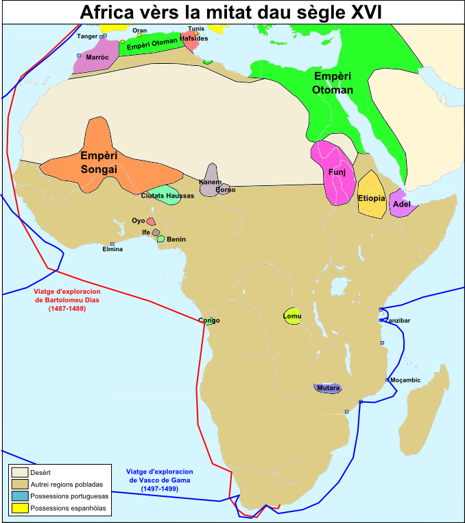 Africa vèrs la mitat dau sègle XVI.